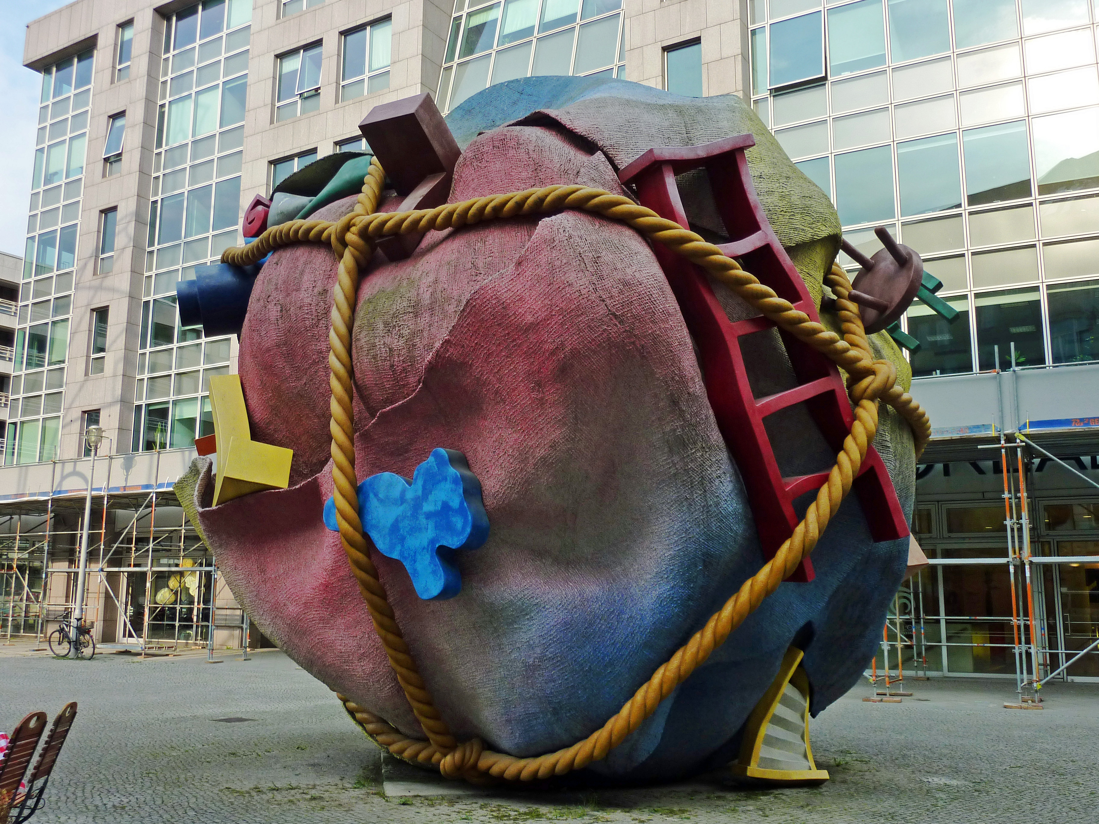 Skulptur 'Houseball' von Claes Oldenburg und Coosje van Bruggen auf dem Bethlehemkirchplatz in Berlin-Mitte. Blickrichtung Nordost zum Philip-Johnson-Haus.